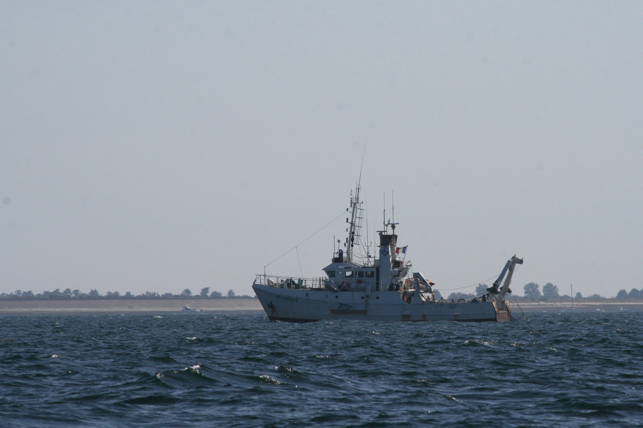 Le Thalia de l'IFREMER en face de l'ile de Ré